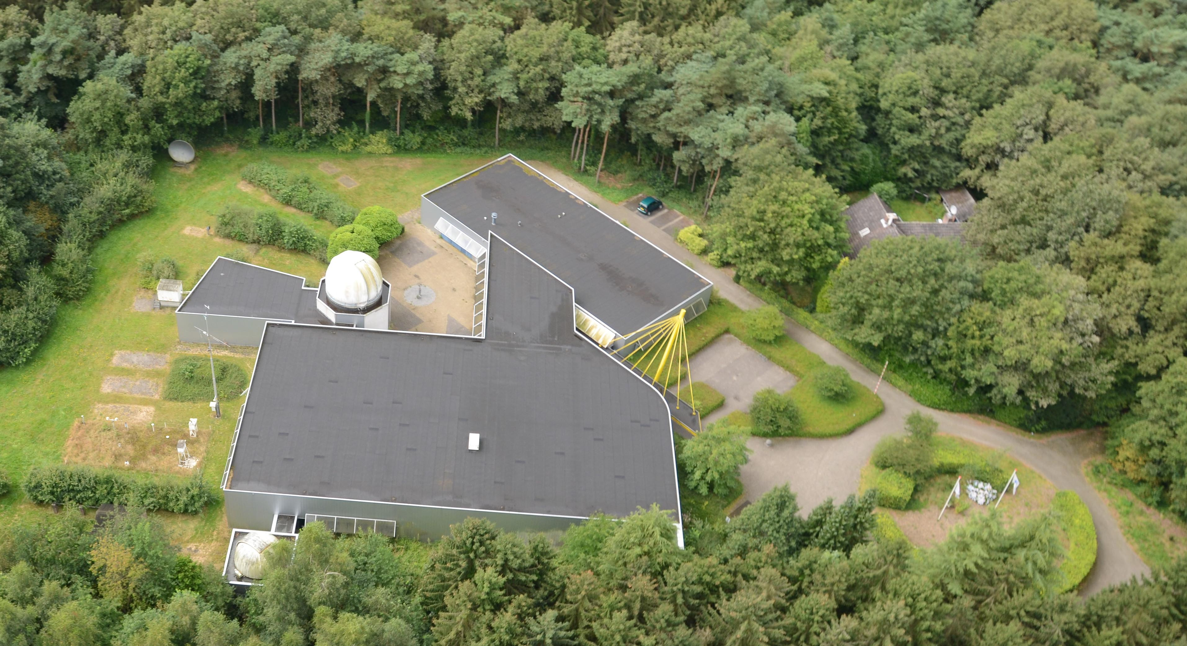 De voormalige volkssterrenwacht Simon Stevin te Hoeven, Nederland